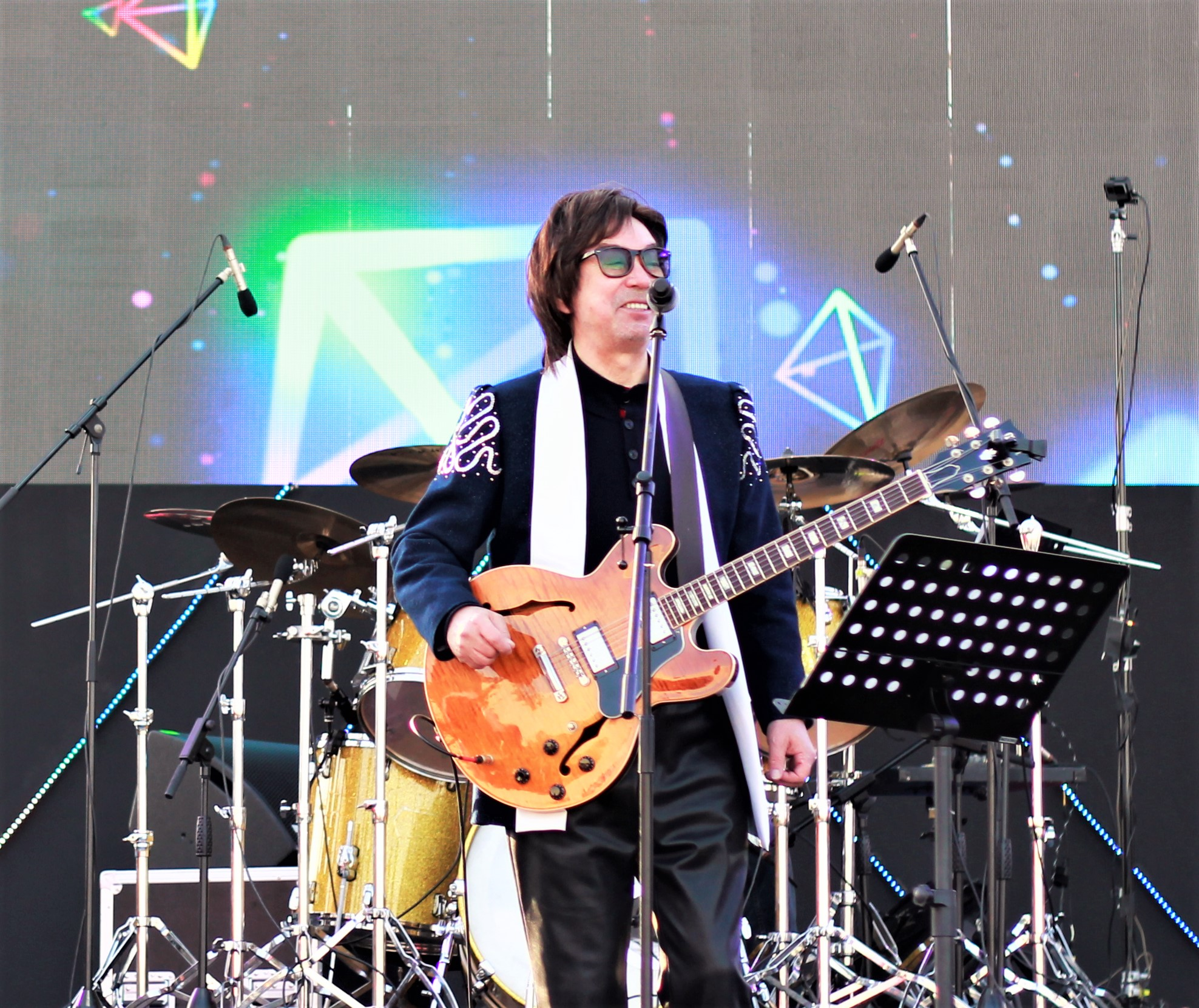 윤수일의 2019년 모습.